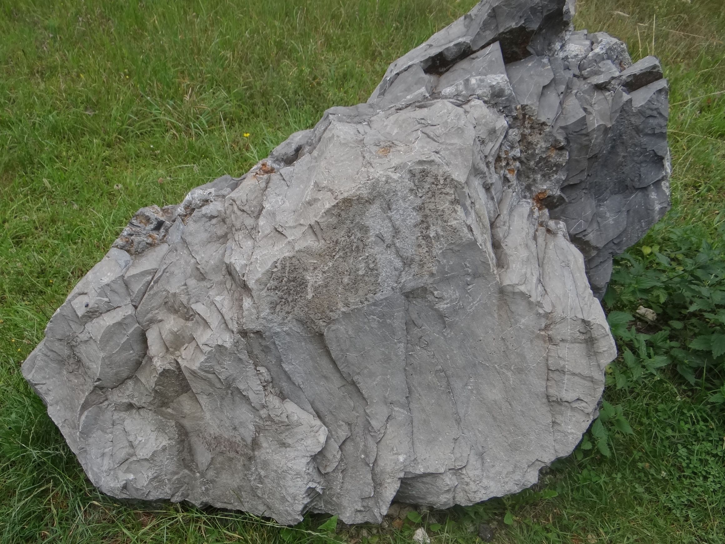 Dolomit dewoński. Location: Poland, kamieniołom Dubie koło Krzeszowic